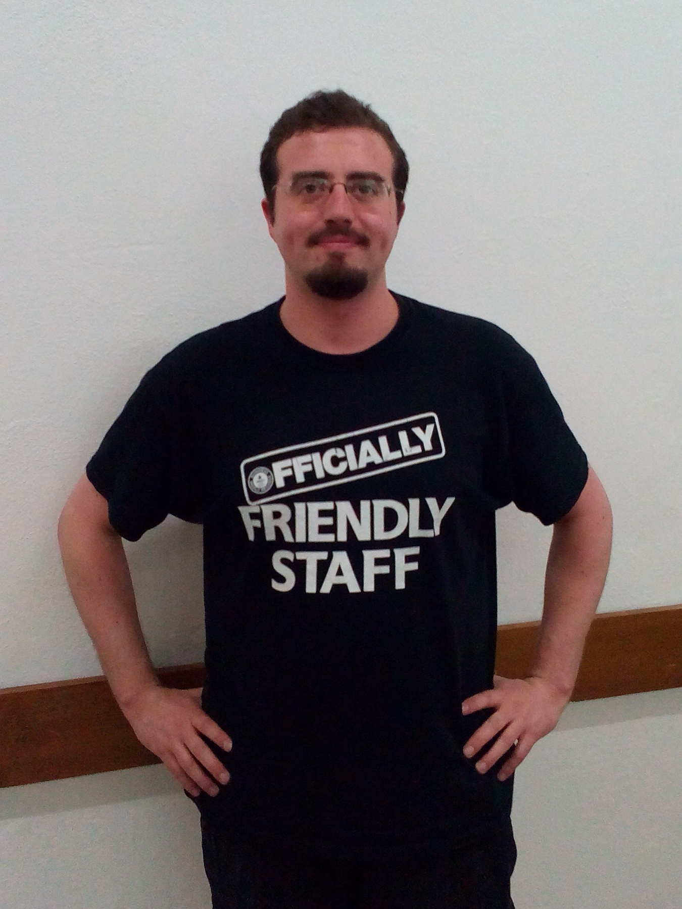 Nicola Ruggiero, itala kaj Esperanta poeto, dum Somera Esperanto-Studado 2014 en Nitro, Slovakio.